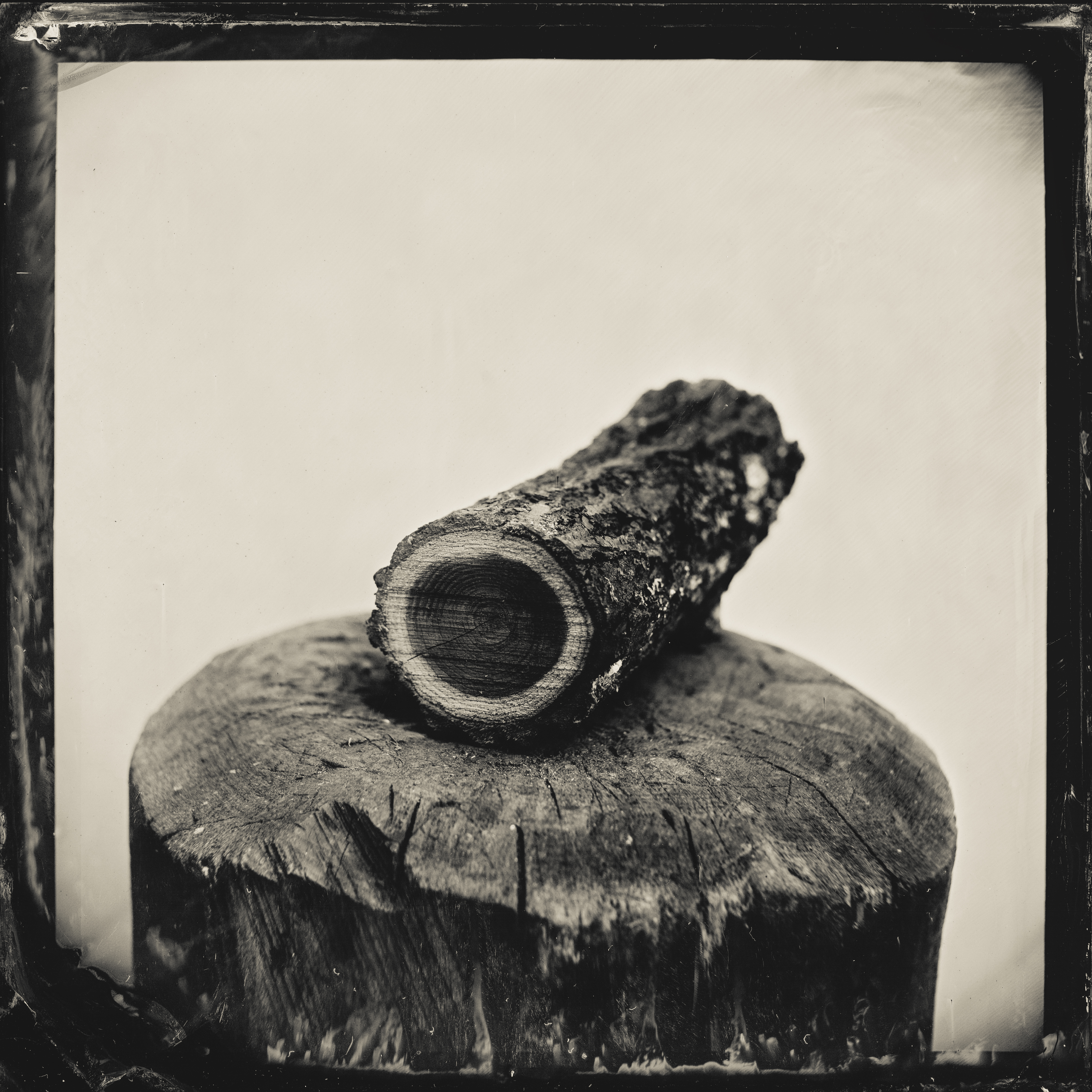 Kollodium Schicht auf Glas von Loïc Lambour.